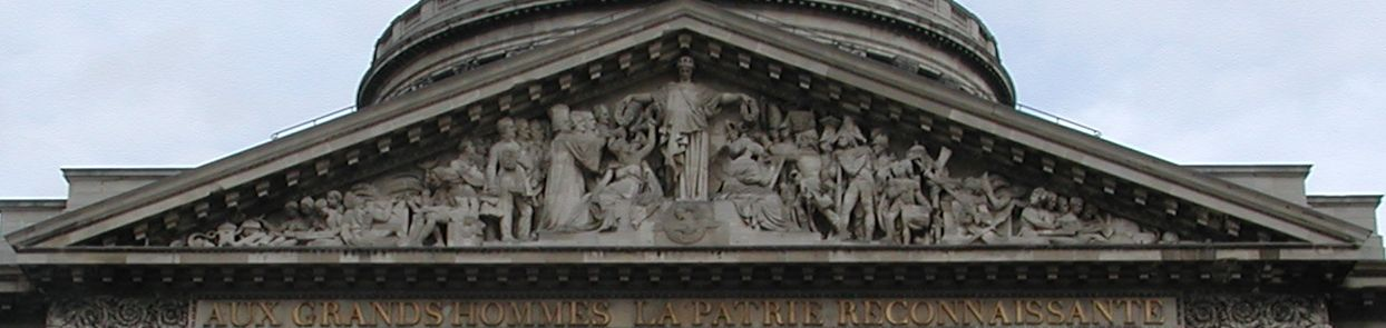 Description = Fronton du Panthéon de Paris Auteur = Piero D'Houin dit Triboulet Date = 2005